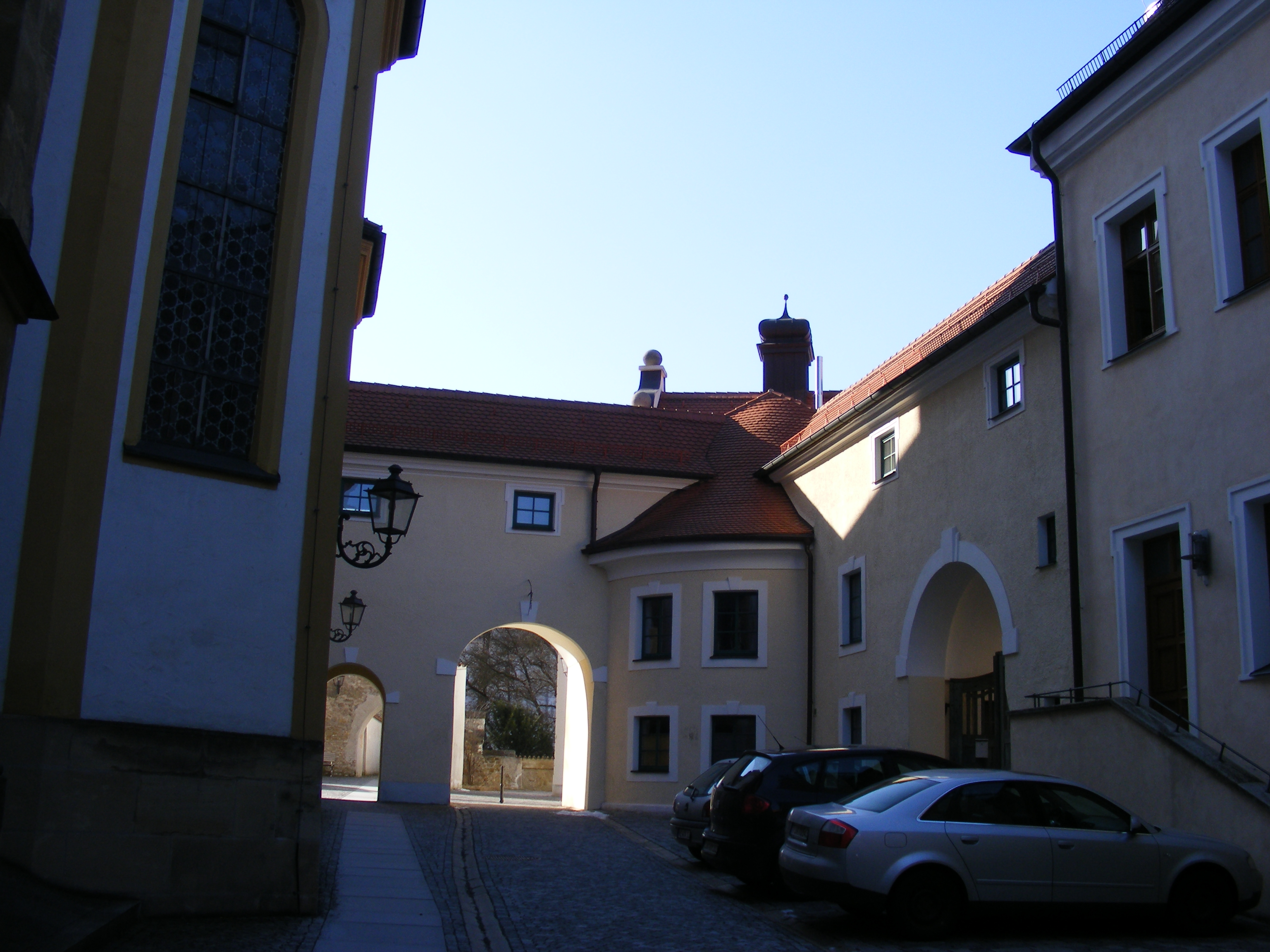 Amberg